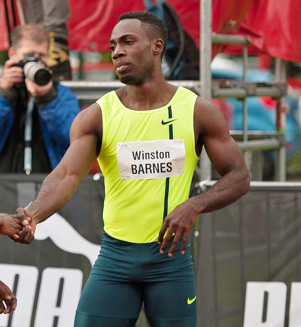 Salzburger Leichtathletik Gala am 27. Mai 2015: Winston Barnes